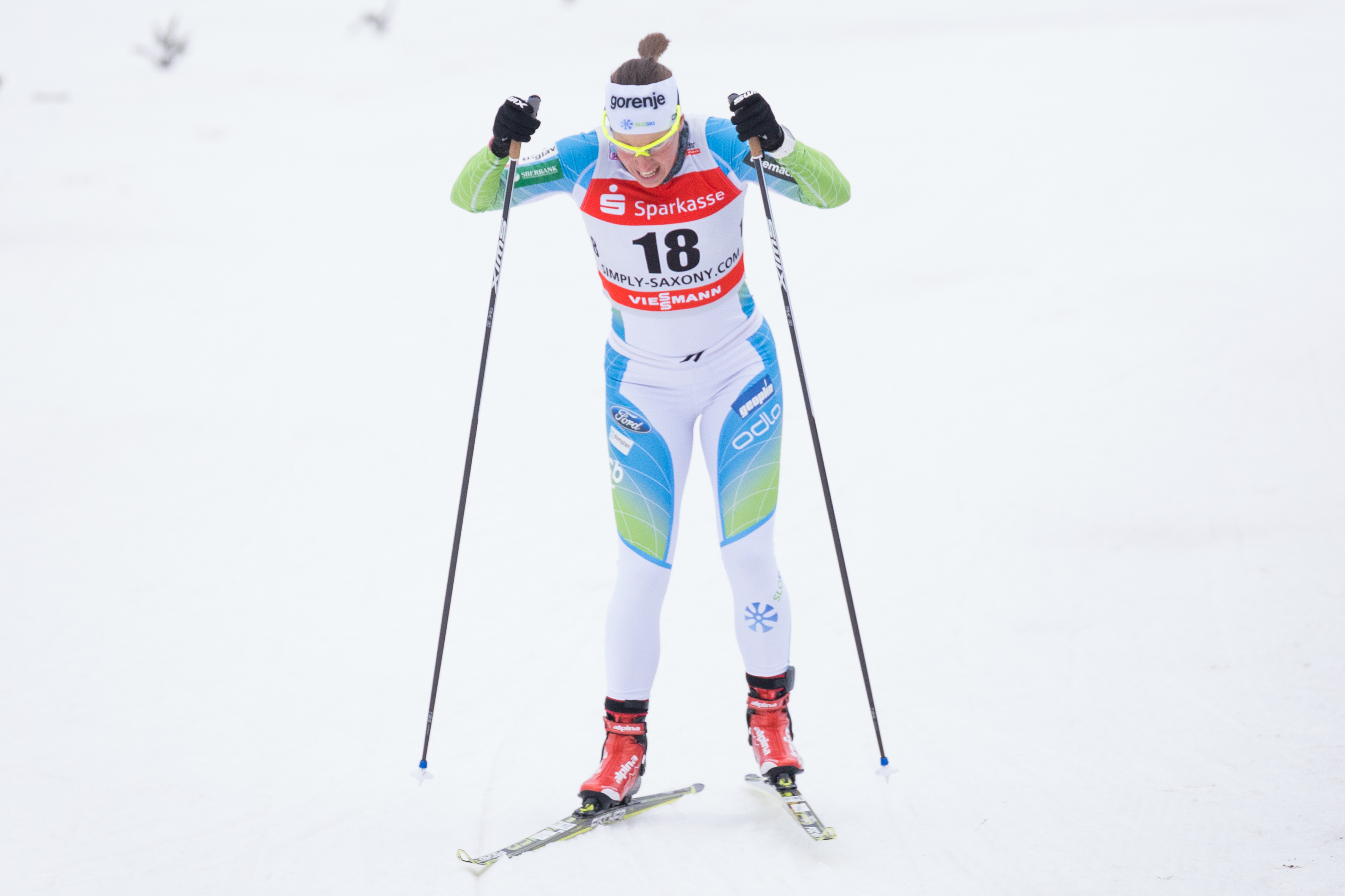 Vesna Fabjan (SLO, Slowenien)